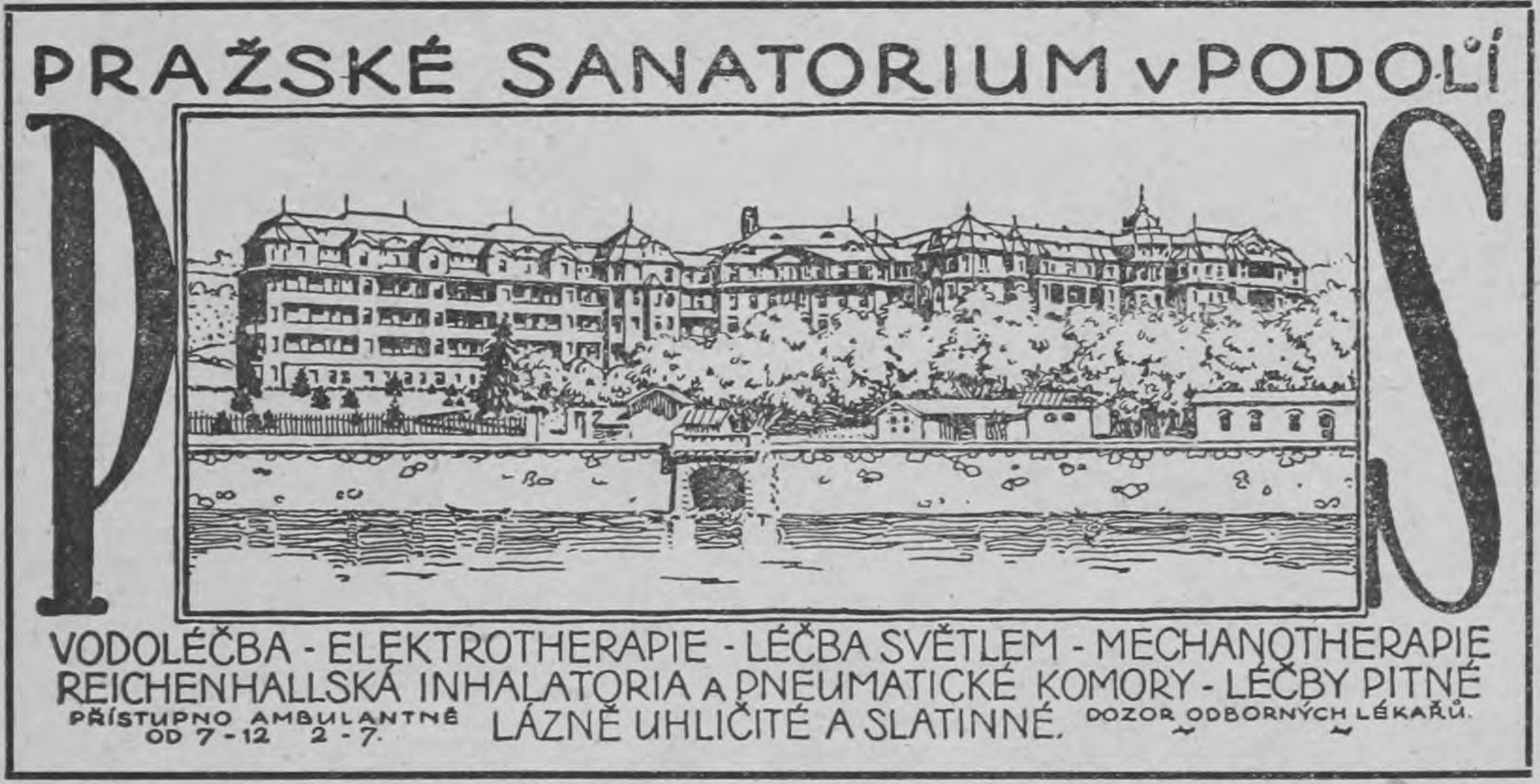 Reklama na Pražské sanatorium v Podolí v časopise Český svět.